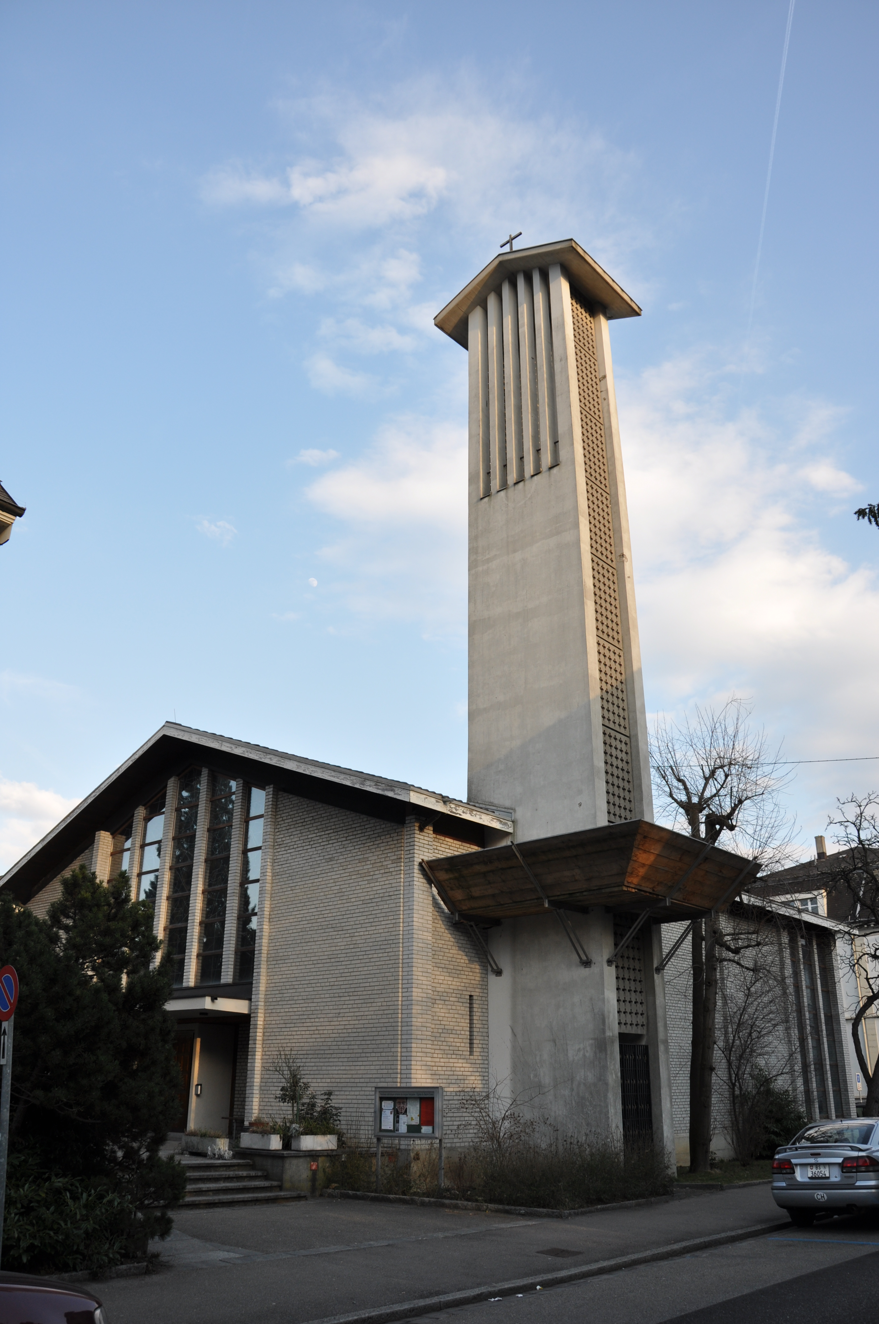 Feierabendstrasse 66, Basel, Switzerland